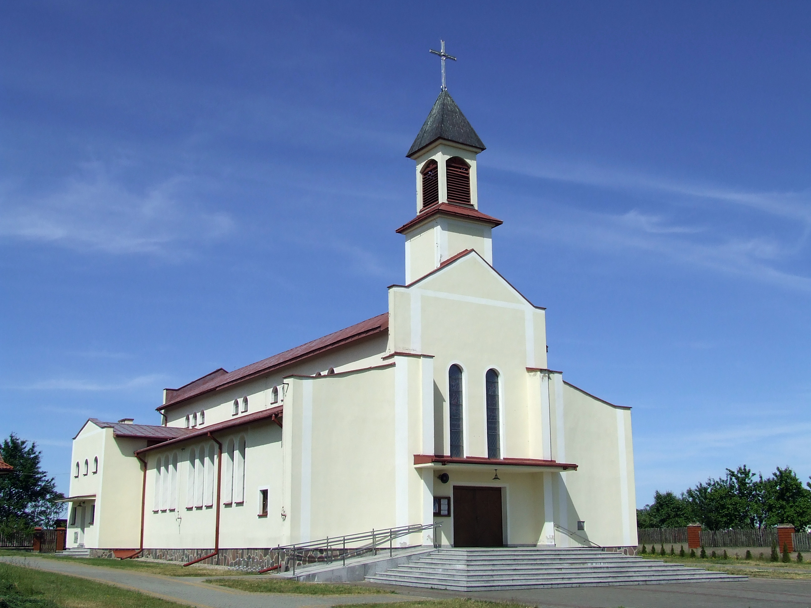 Kościół parafialny w Zabielu